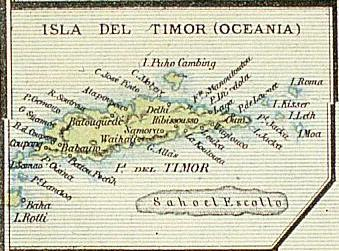 Isla del Timor. Detail from a map Nuevo mapa de España y Portugal y de sus colonias, ilustrado con los 49 escudos de sus Provincias y con las 14 Decoraciones Militares, indicando todos los caminos de hierro, carreteras, ríos y canales, Escala 1/165000